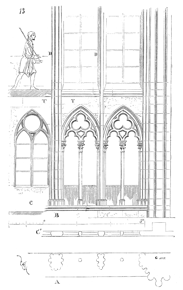 ... C'est vers le milieu du XIIIe siècle que ce parti fut adopté dans un grand nombre d'églises du domaine royal, notamment à la cathédrale de Troyes et à l'abbaye de Saint-Denis, en grande partie reconstruite sous le règne de Louis IX. Le triforium de la nef et du chœur de cette dernière église est très-remarquable comme composition. Nous donnons (fig. 13) le plan A et l'élévation B d'une demi-travée de ce triforium. En C, est tracée la claire-voie postérieure C' du plan, laquelle reçoit le vitrage; de sorte que l'on aperçoit les vitraux de cette claire-voie C à travers l'arcature antérieure. Ici le triforium se relie plus intimement avec les grandes fenêtres supérieures qu'à Amiens, au moyen des colonnettes de meneaux D ...